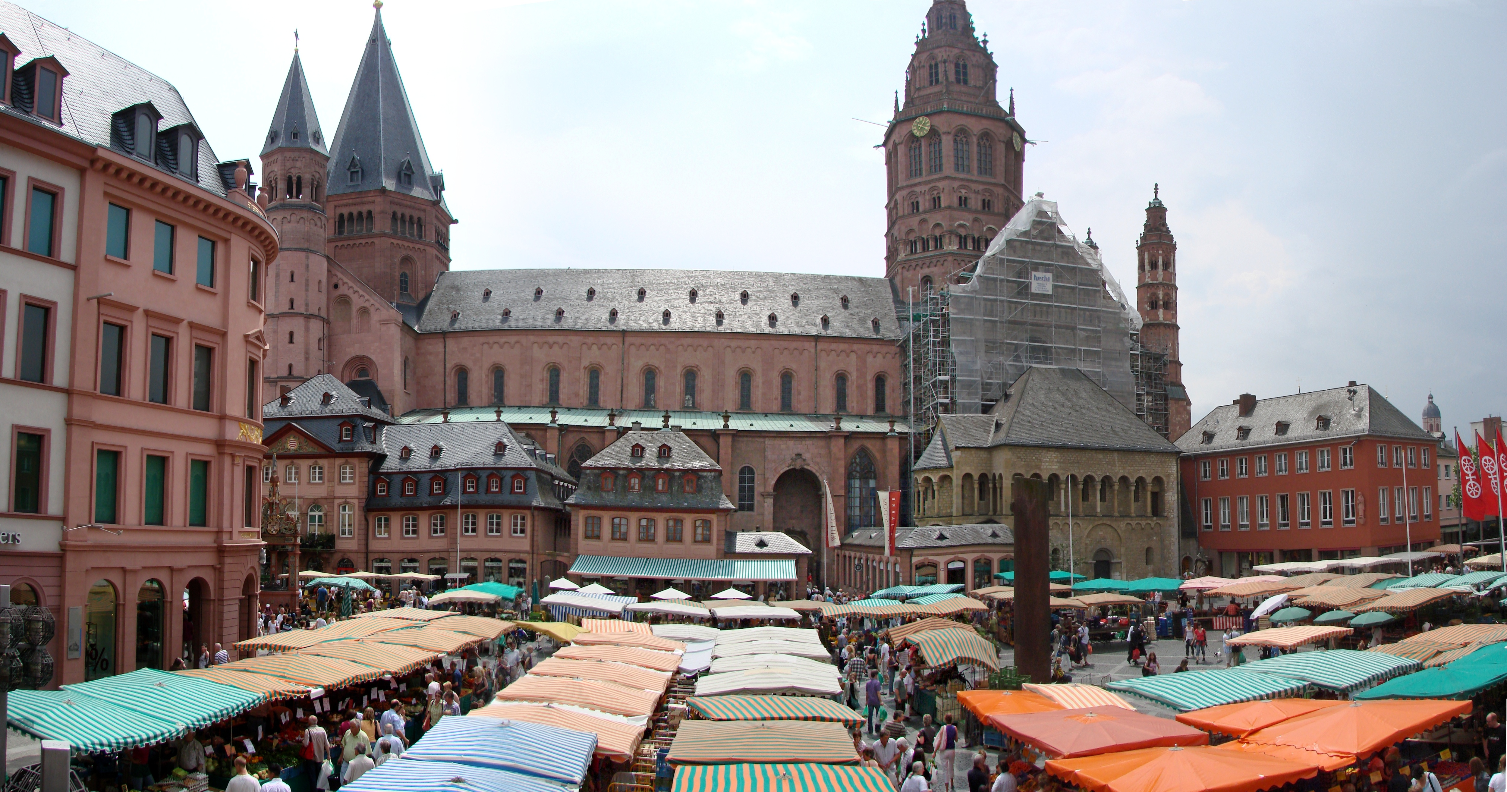 Wochenmarkt auf dem Mainzer Markt, einem der Domplätze